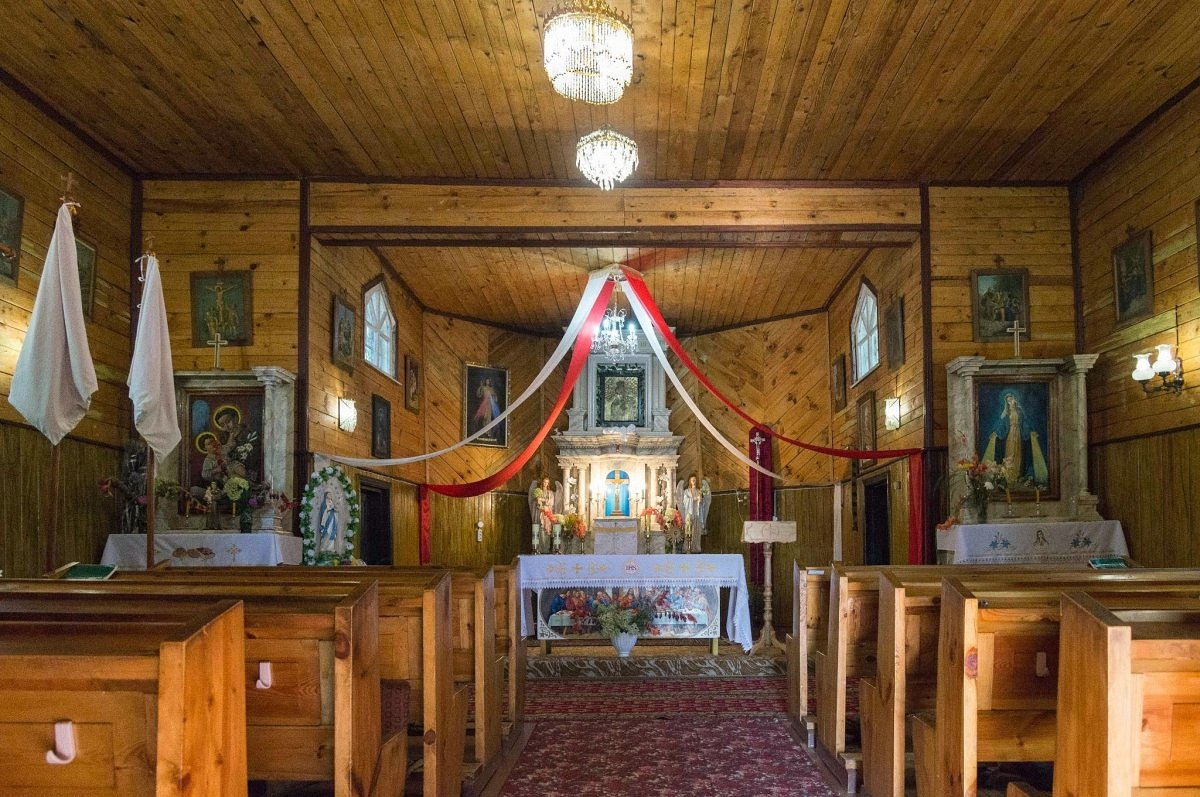 Пліса. Драўляны касцёл